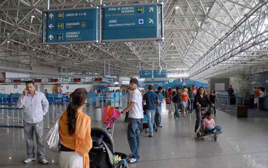 Rio de Janeiro - Movimentação no Aeroporto Internacional do Rio de Janeiro (Terminal 2, Galeão)